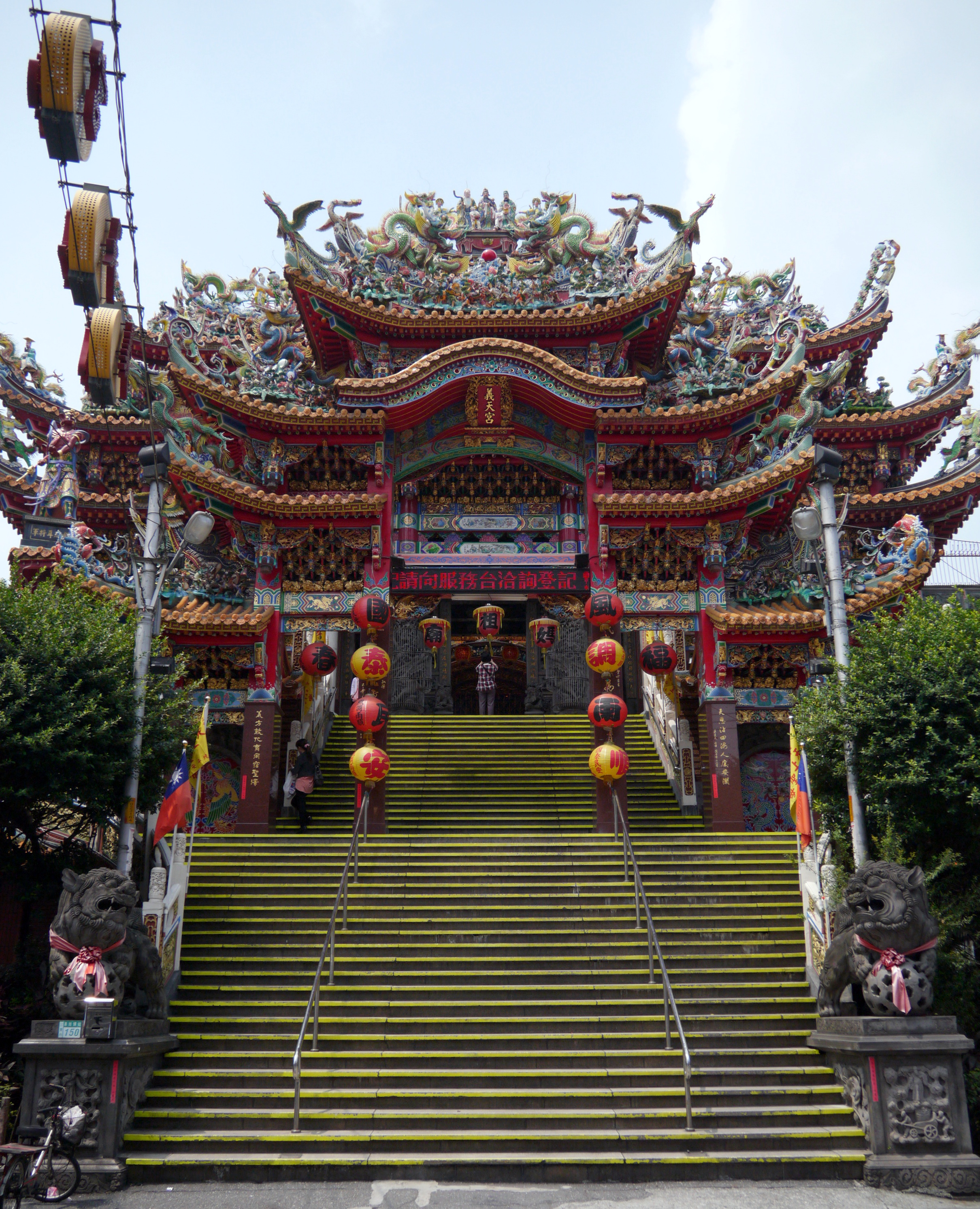 三重義天宮正面